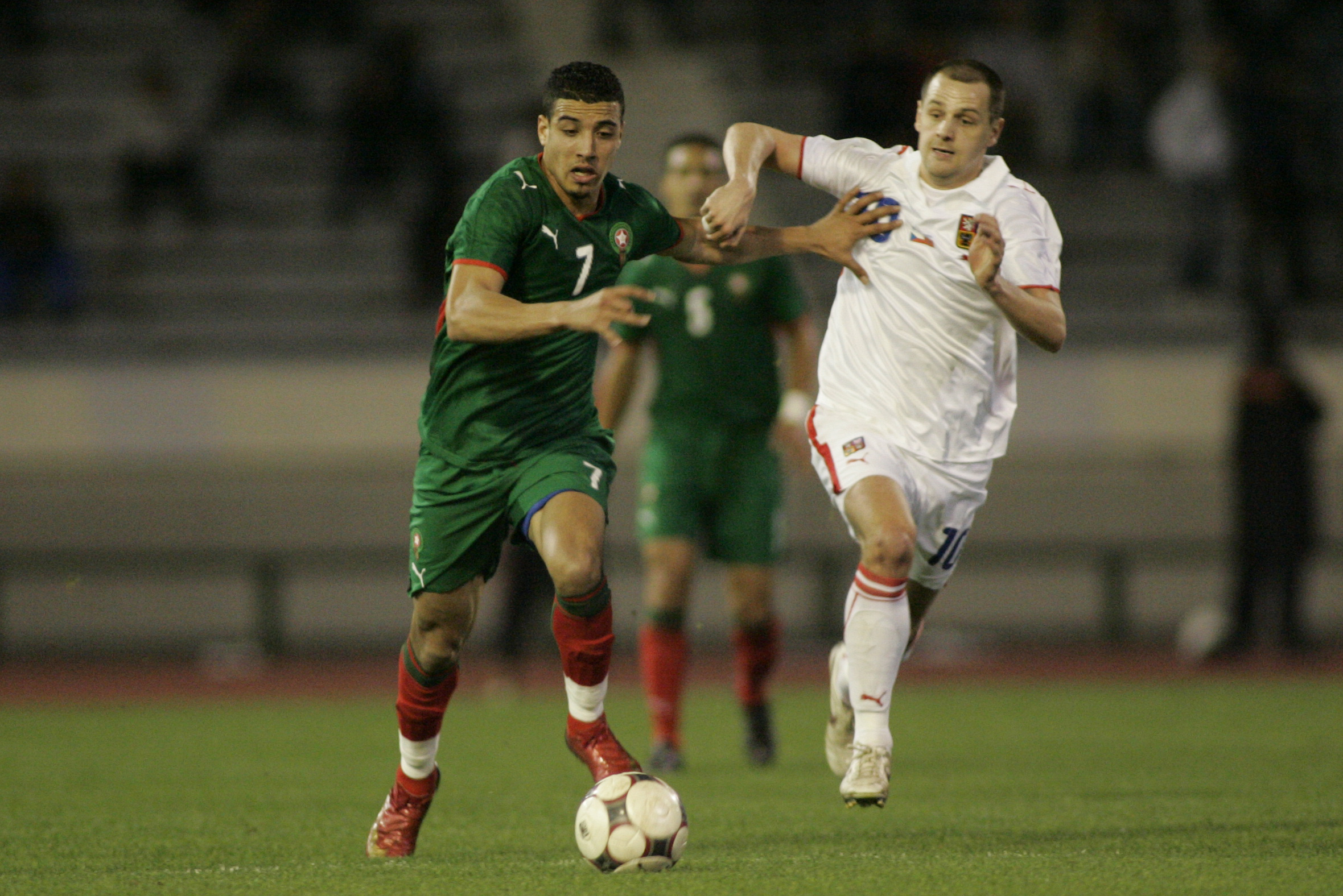 Nabil Dirar, Marek Matějovský